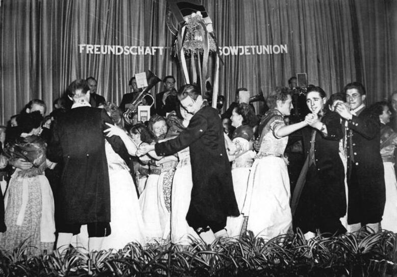 Magdeburg, Tanzvorführung der MTS Domersleben Zentralbild Rösener 1.12.1953 Bauern spielen für Arbeiter Ende November 1953, im Monat der Deutsch-Sowjetischen Freundschaft, sangen und spielten die Mitglieder des Börde-Ensembles der MTS Domersleben im Kultursaal "Ernst Thälmann" des Reichsbahnausbesserungswerkes Magdeburg-Salbke für den Stadtbezirk Südost. Höhepunkt des Programms, in dem das Leben der Börde-Bauern gezeigt wird, ist die Darstellung des Domerslebener Erntefestes. UBz: Tanz unter dem Erntekranz.